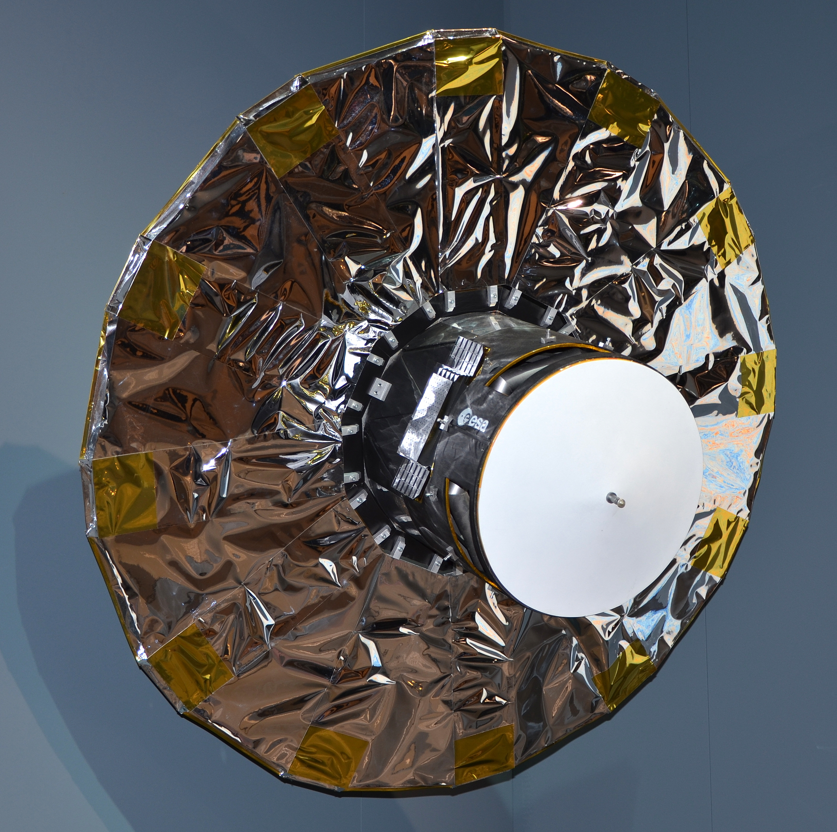 Maquette de Gaia salon du Bourget 2013